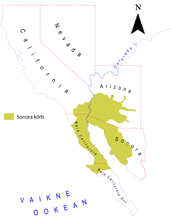 Sonora kõrbe asendikaart